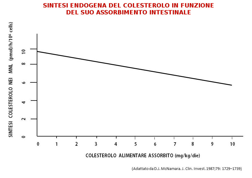 Relazione tra assorbimento e sintesi endogena di colesterolo nello studio di McNamara (1987)